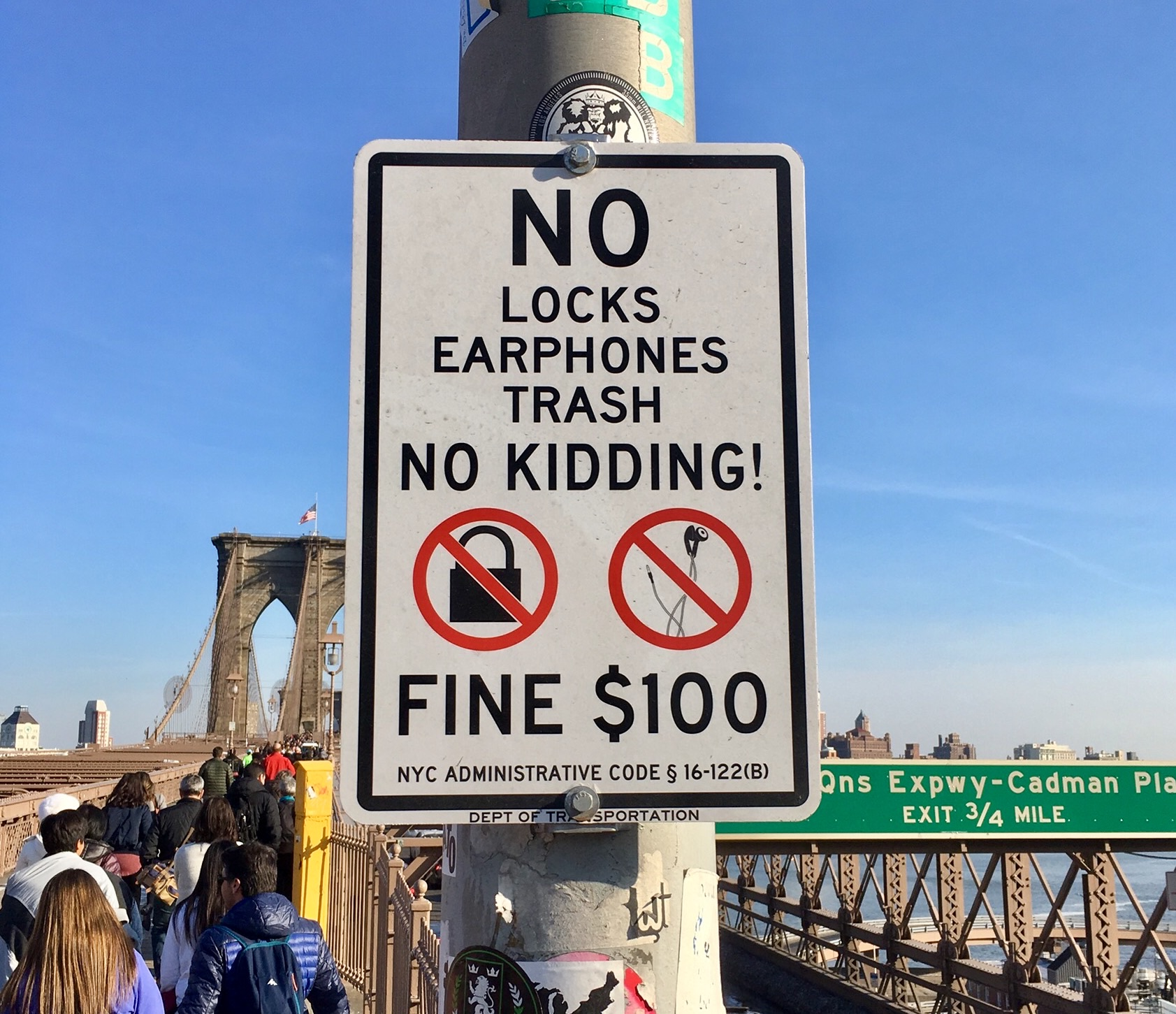 Mit 100 $ schlägt es zu Buche, wenn man Liebesschlösser auf der Brooklyn Bridge in New York befestigt und erwischt wird. Trotzdem gibt es Menschen, die dies tun. Die Schlösser werden aber in regelmäßigen Abständen wieder entfernt.